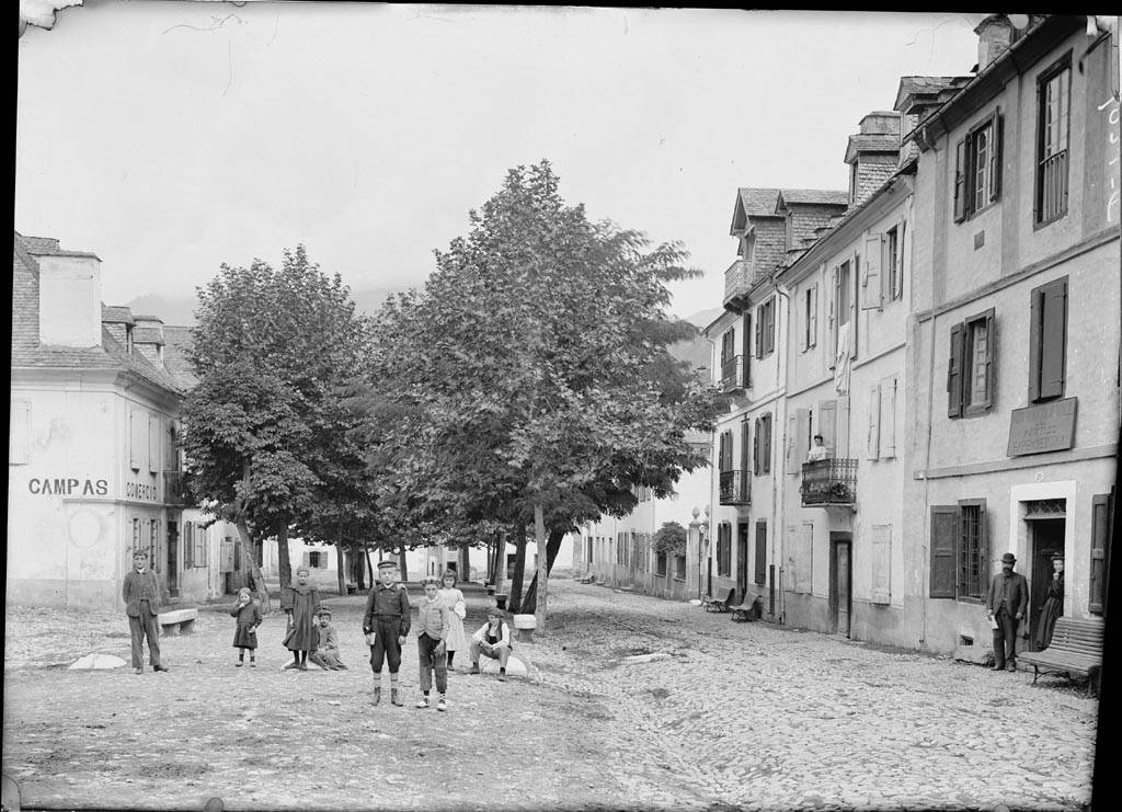 Imatge